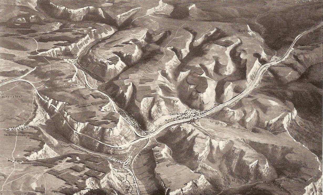 Reichsautobahn am Steilhang der Alb. Reliefpanorama mit Boßler und den Orten Gruibingen und Gosbach an der Fils